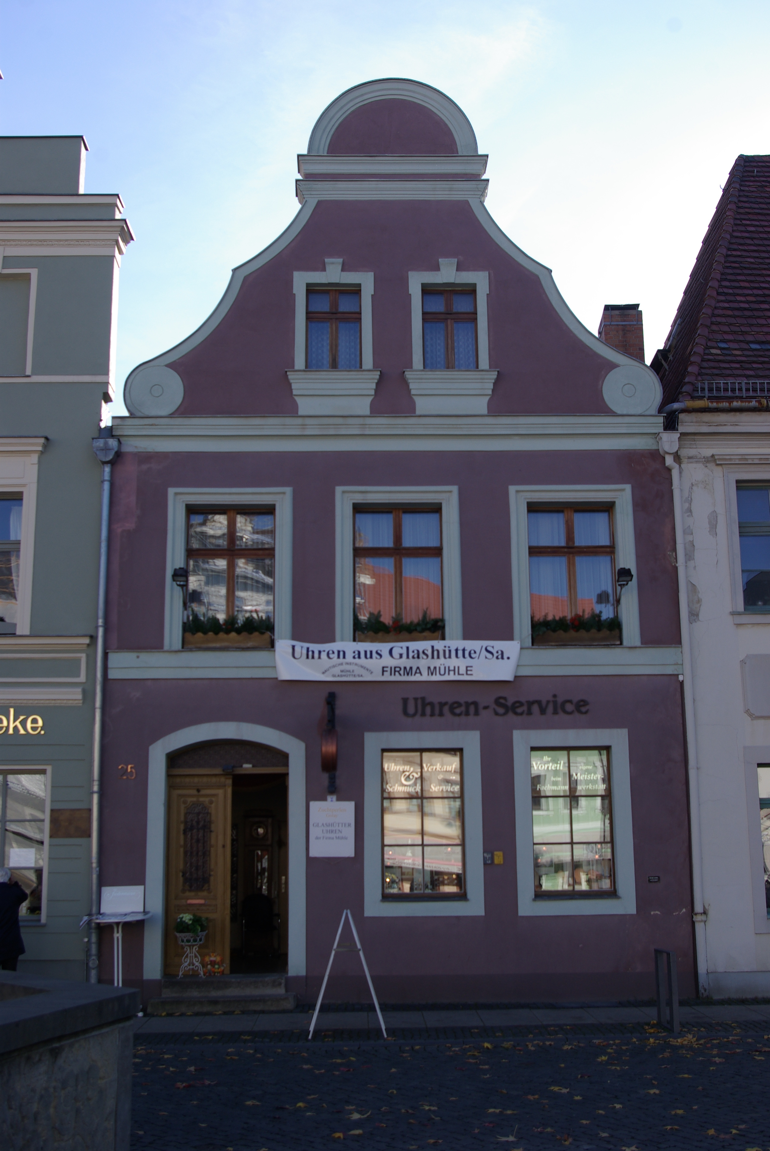 Cottbus in Brandenburg. Das Haus Altmarkt 25 steht unter Denkmalschutz.